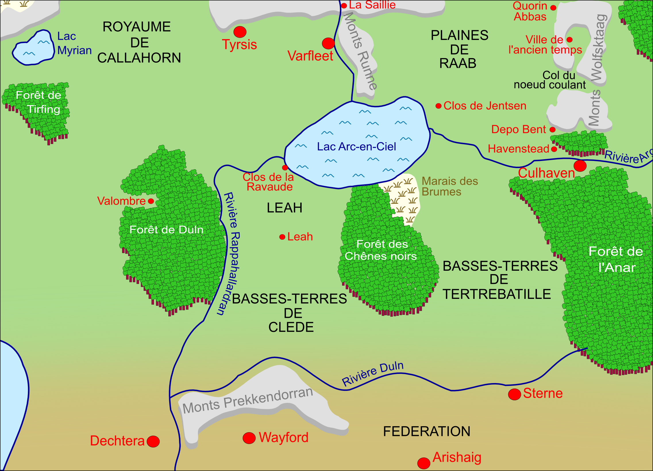 Terres du Sud version 2 - Shannara.jpg